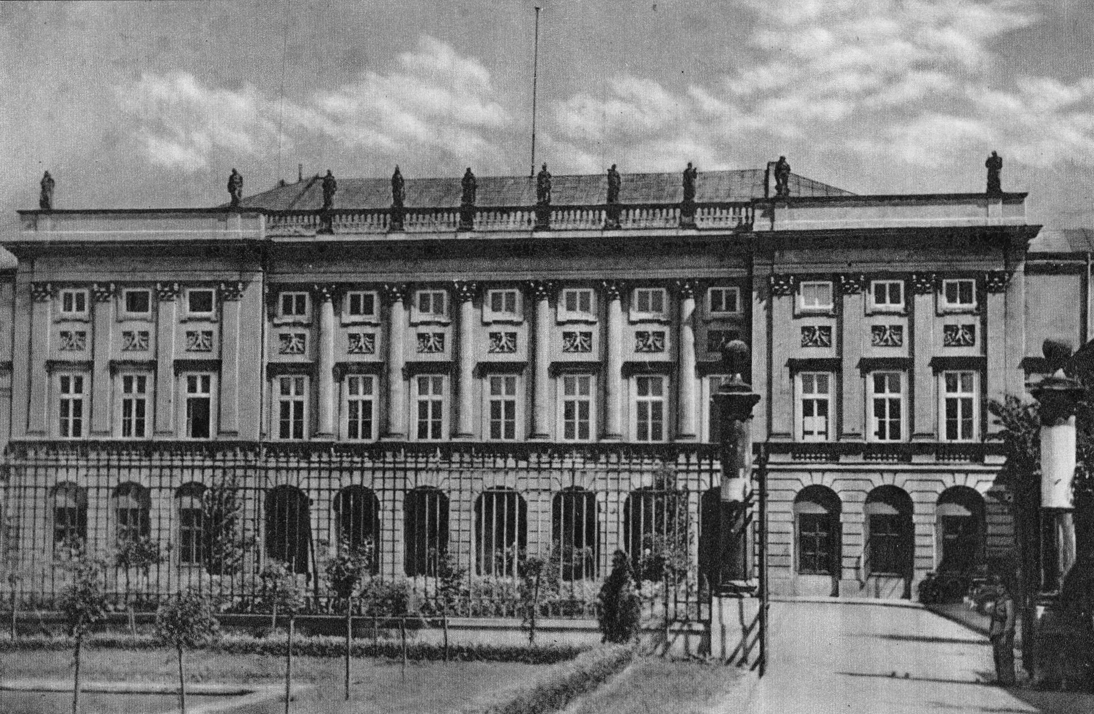 Pałac Rady Ministrów (obecnie Prezydencki) w Warszawie